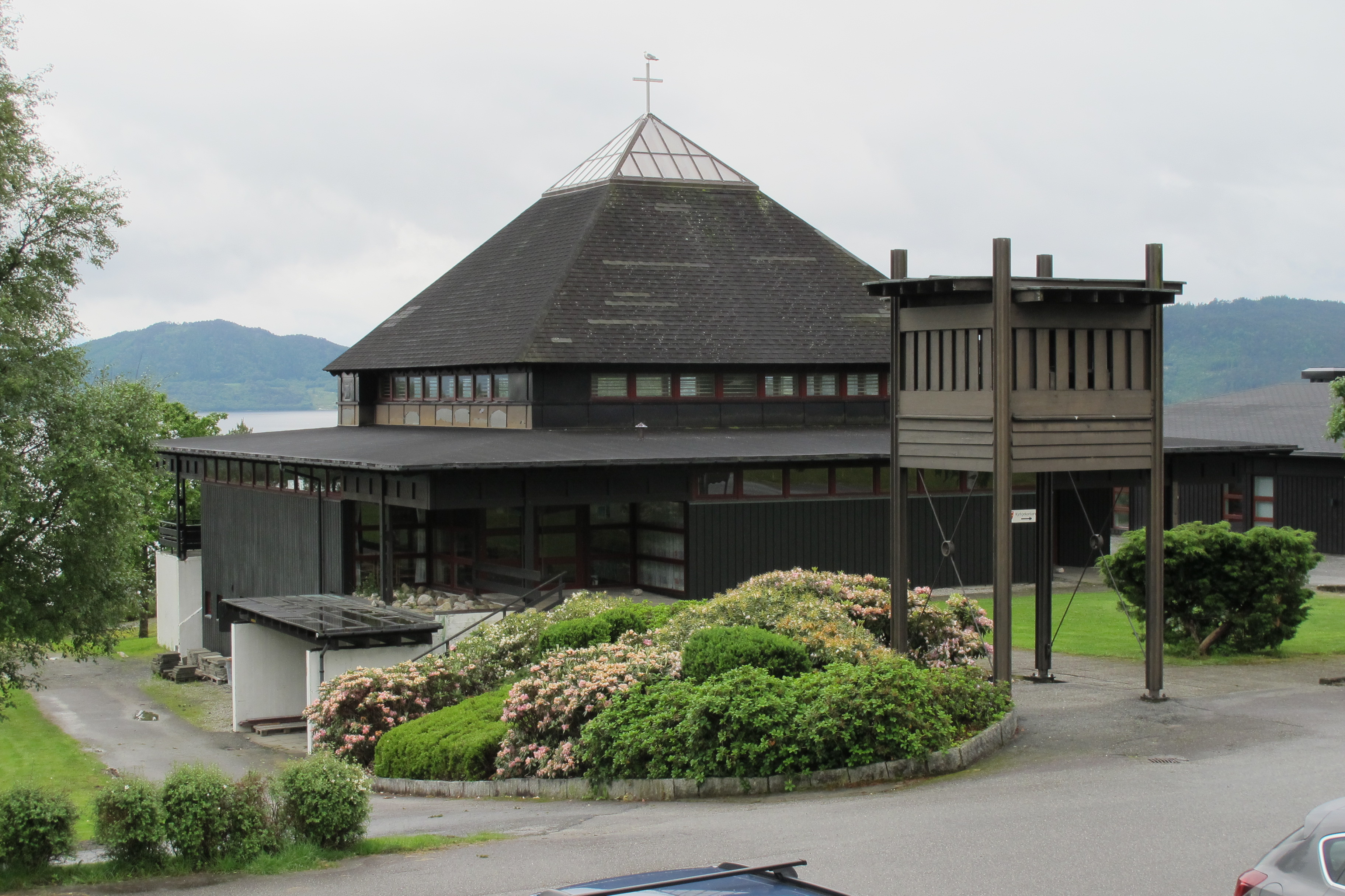 Valen kyrkje, juni 2017